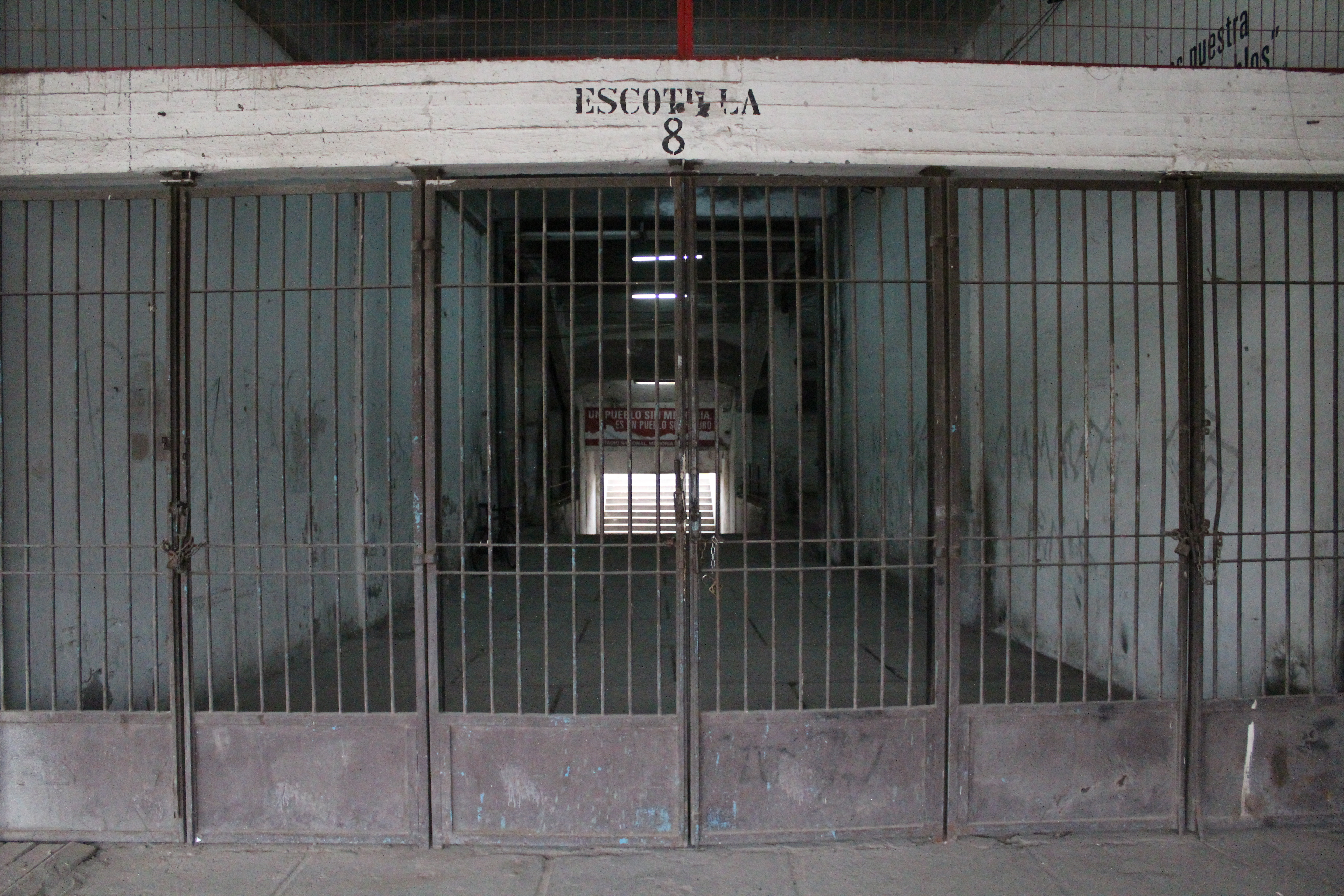 Las 8 escotillas del estadio nacional fueron utilizadas como celdas colectivas, albergando entre 300 y 400 prisioneros cada una.